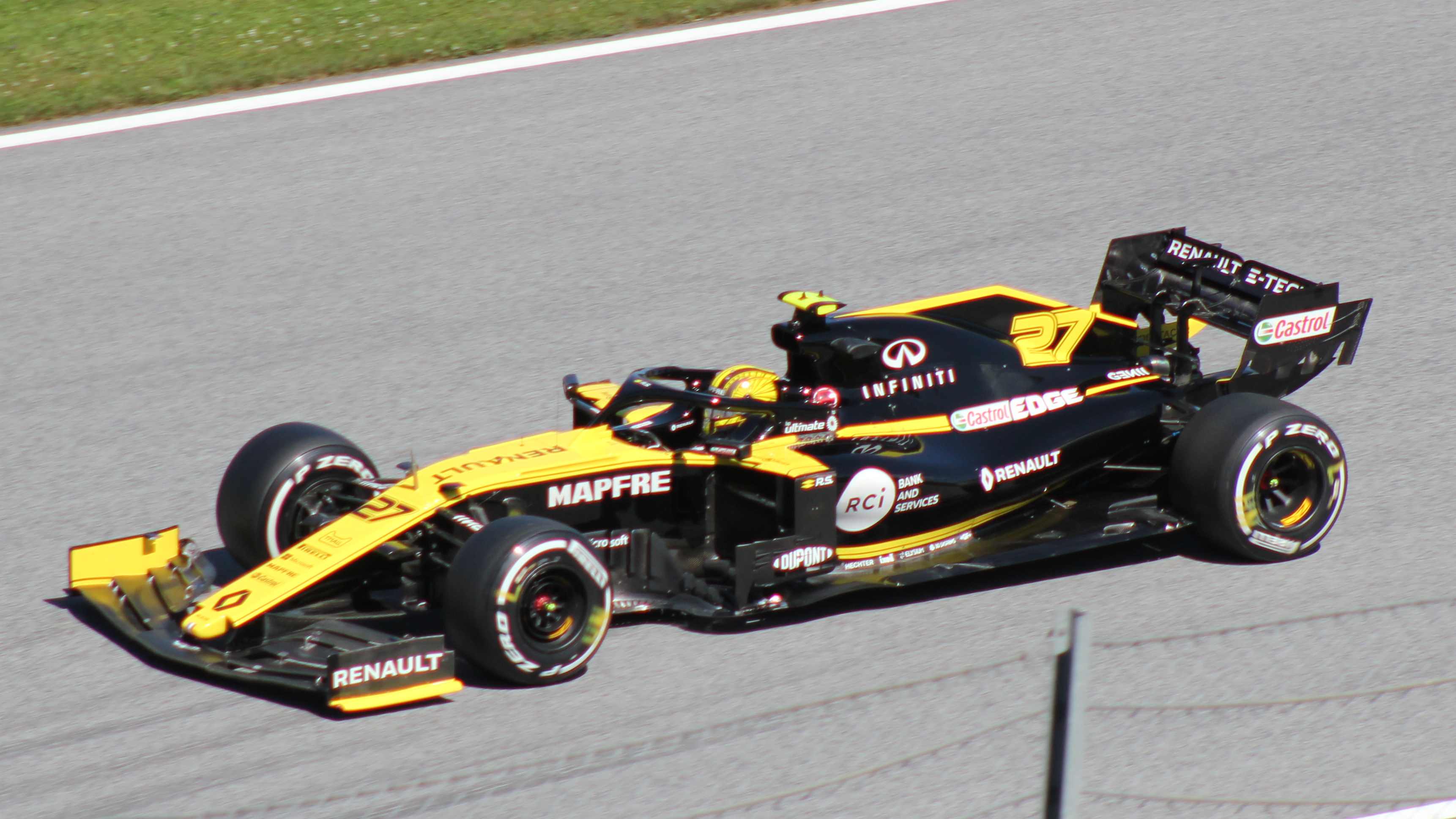 Hülkenberg beim Rennwochenende in Österreich 2019